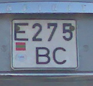 Двухрядный автомобильный номер ПМР